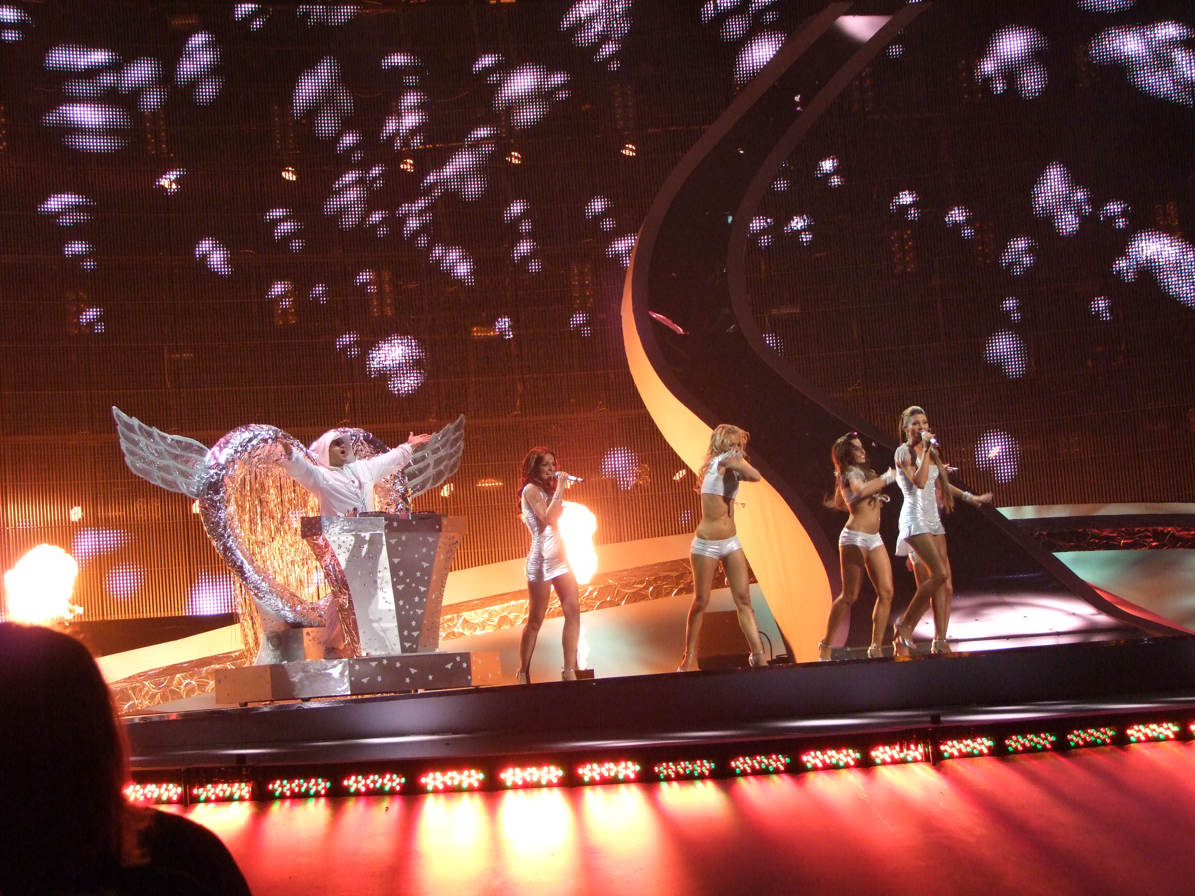 Semifinal 2 Eurovision 2008